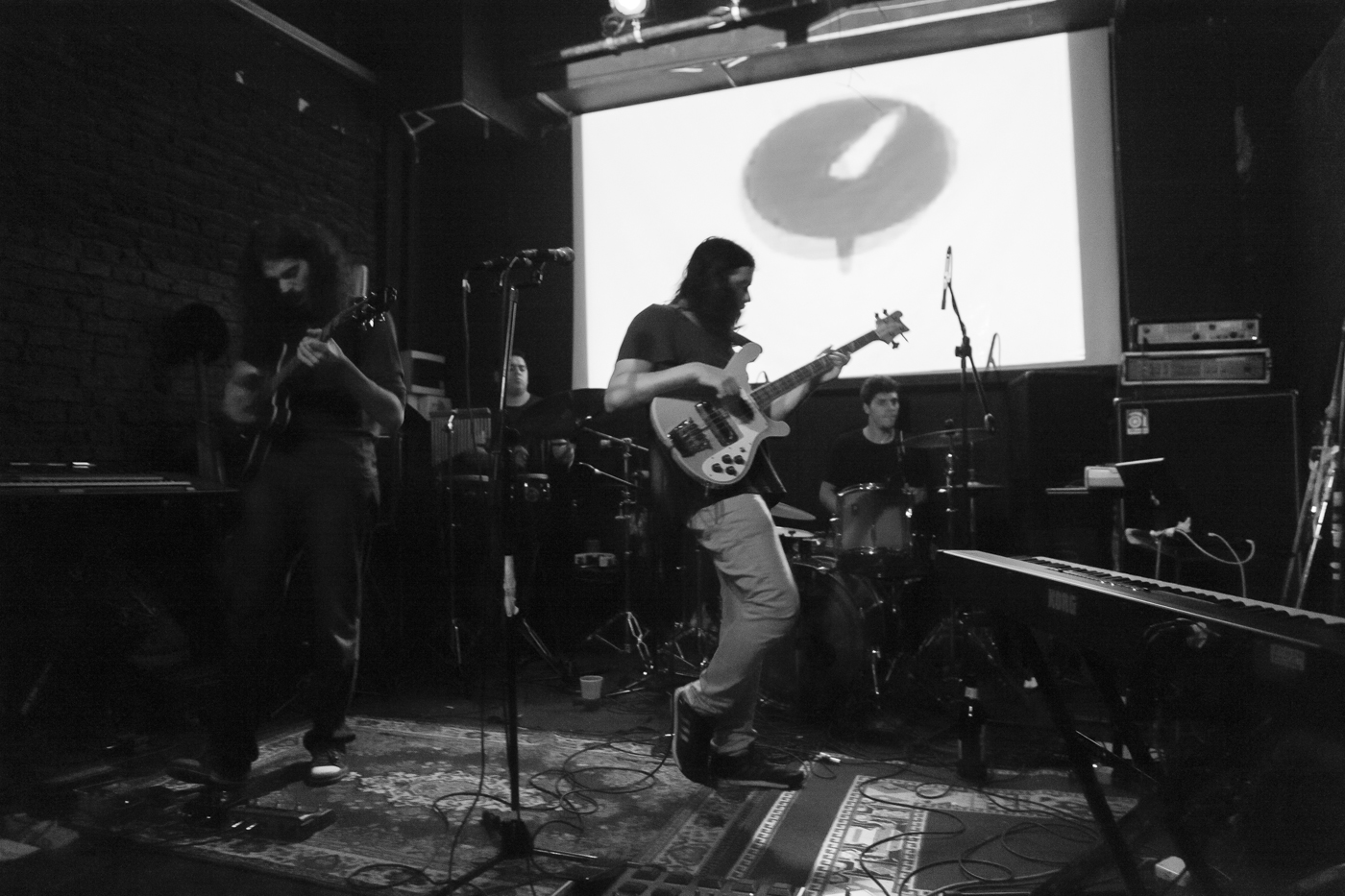 Vlad Tepes presentando su pimer disco